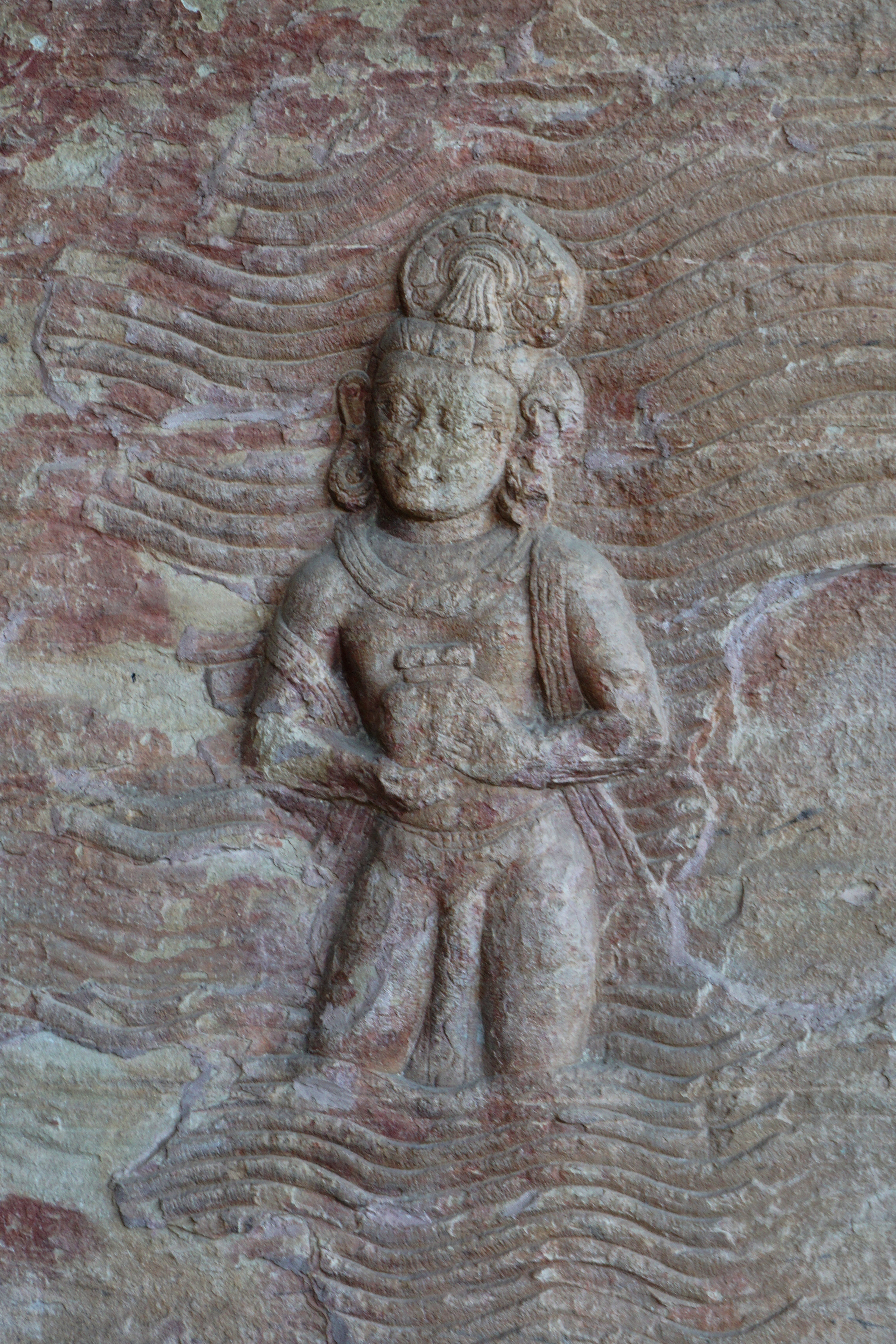 Samudra (ocean) near Varaha panel. Udayagiri Caves, Vidisha, India